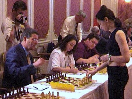 Jens Beutel und Alexandra Kosteniuk, Simultanspiel bei den Chess Classic Mainz 2002.